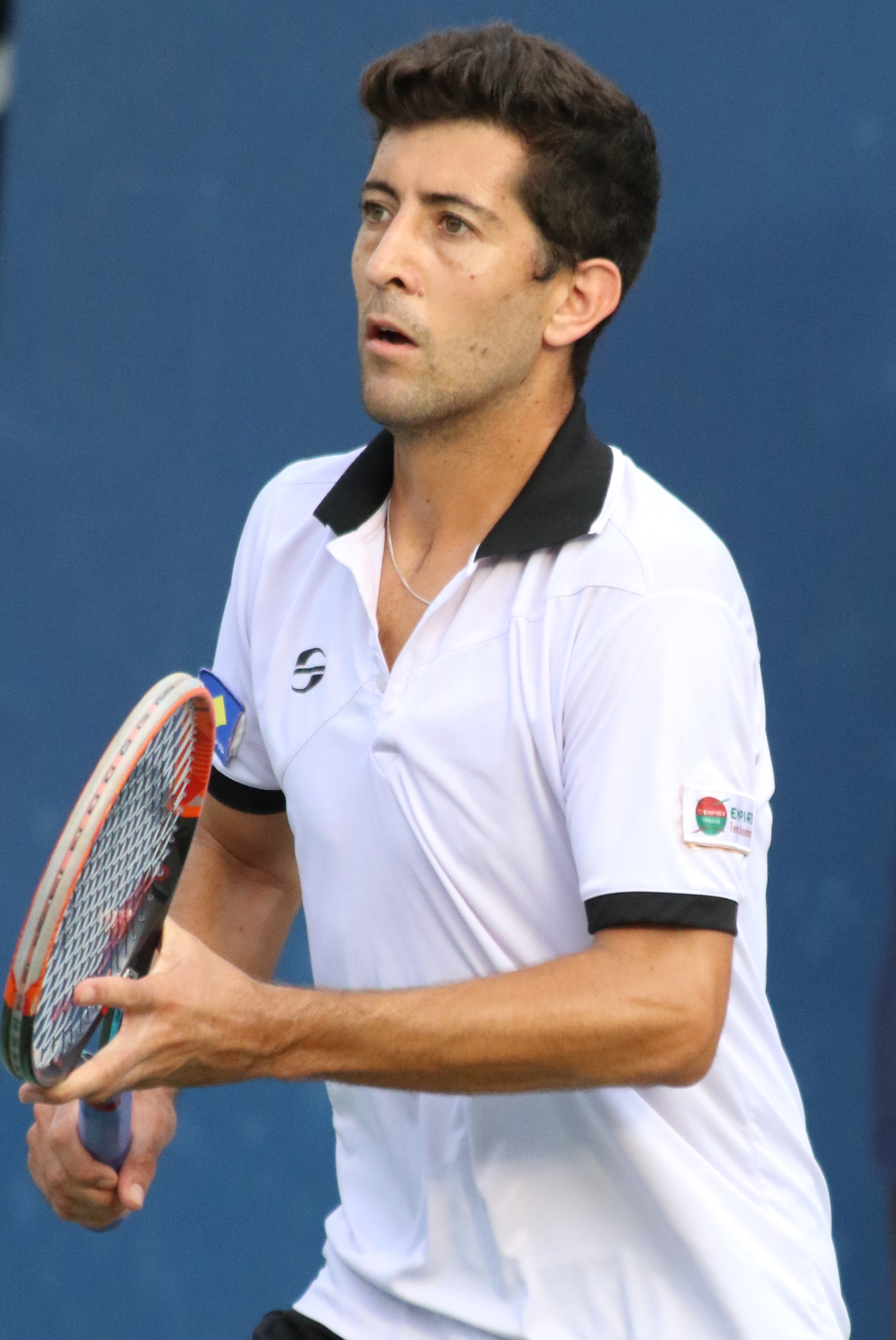 Podlipnik Castillo US16 (6)